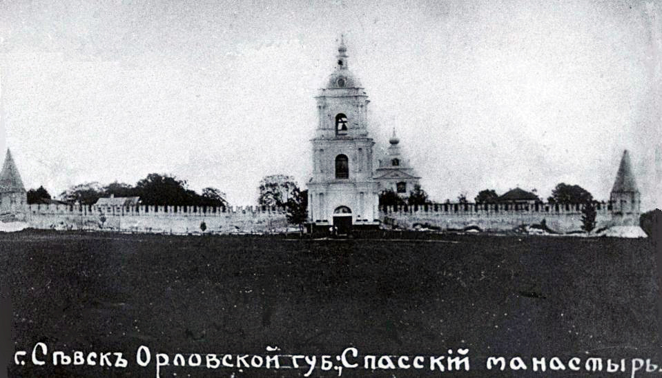 Севский Спасо-Преображенский монастырь до революции